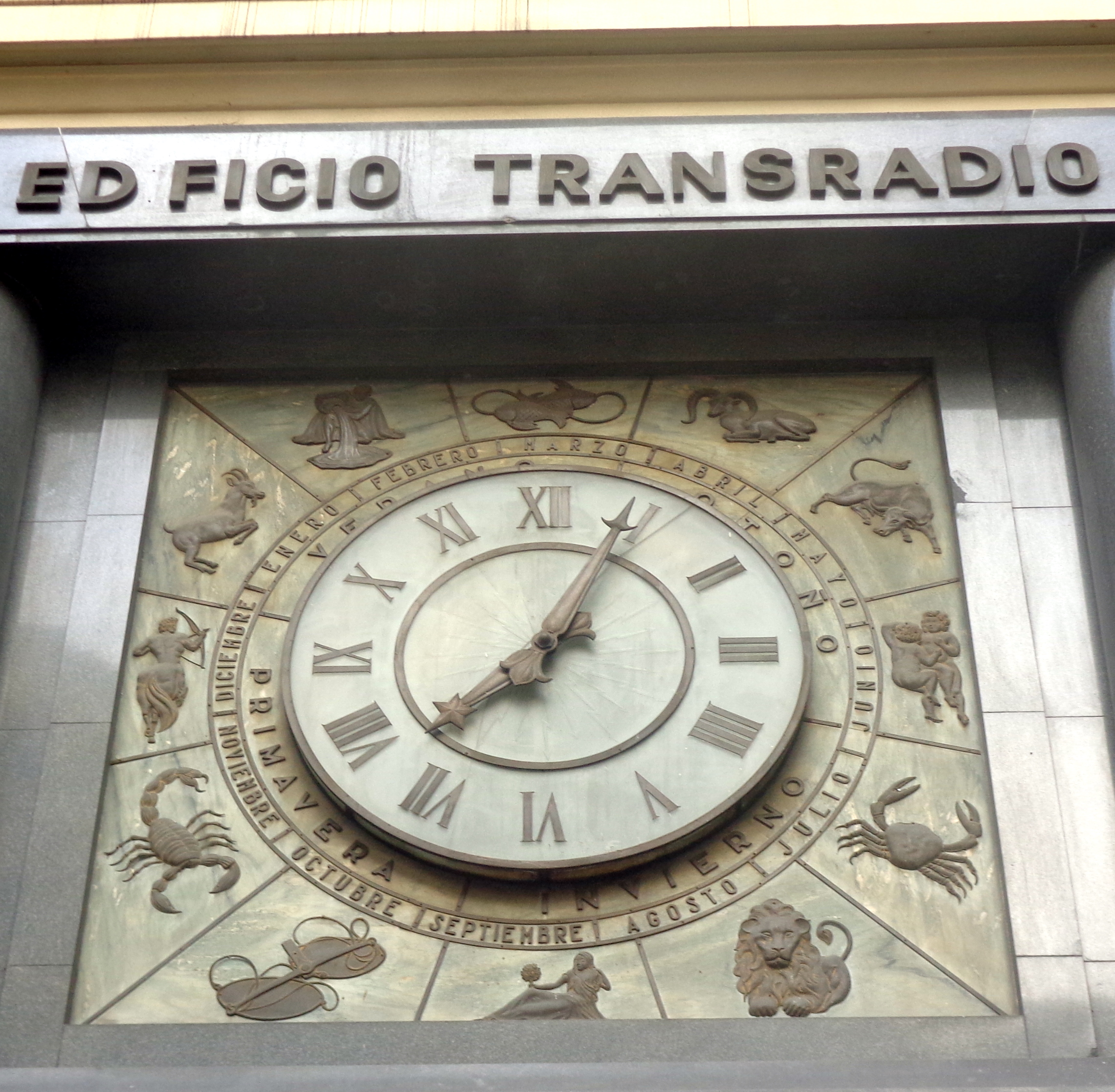 Reloj en la entrada del edificio Transradio Internacional, en San Martín y Avenida Corrientes, Barrio de San Nicolás, Buenos Aires, Argentina.